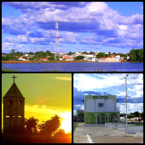 Imagens do município de Dirceu Arcoverde